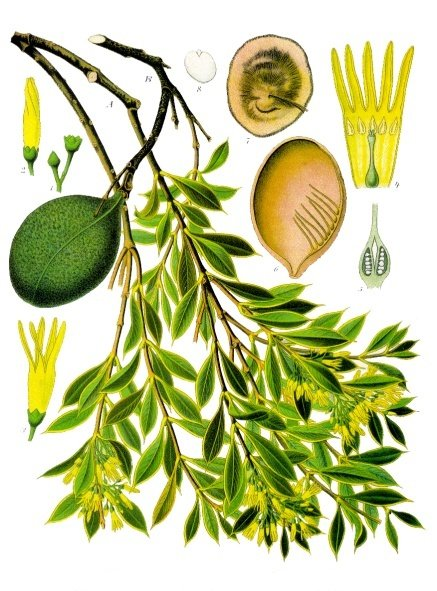 Quebrachobaum. A Blütentragender Zweig, natürliche Grösse B Fruchtzweig, natürliche Grösse 1 Kelch 2 Blütenknospe 3 geöffnete Corolle von aussen 4 Corolle von innen 5 Fruchtknoten, Längsschnitt 6 Fruchtschale von innen mit Nabelsträngen 7 Samen mit Nabelstrang 8 Keimling.